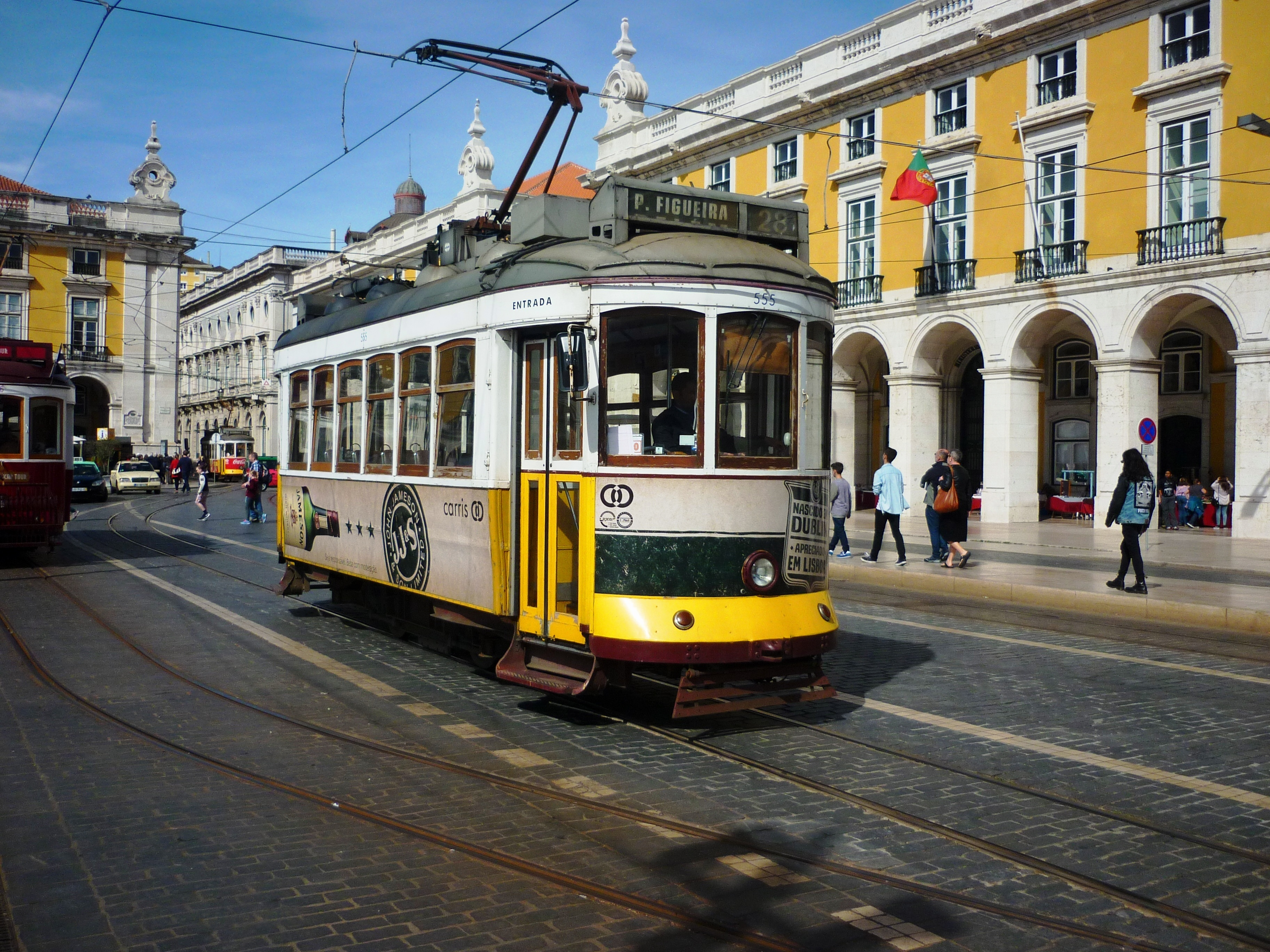 555 Carris